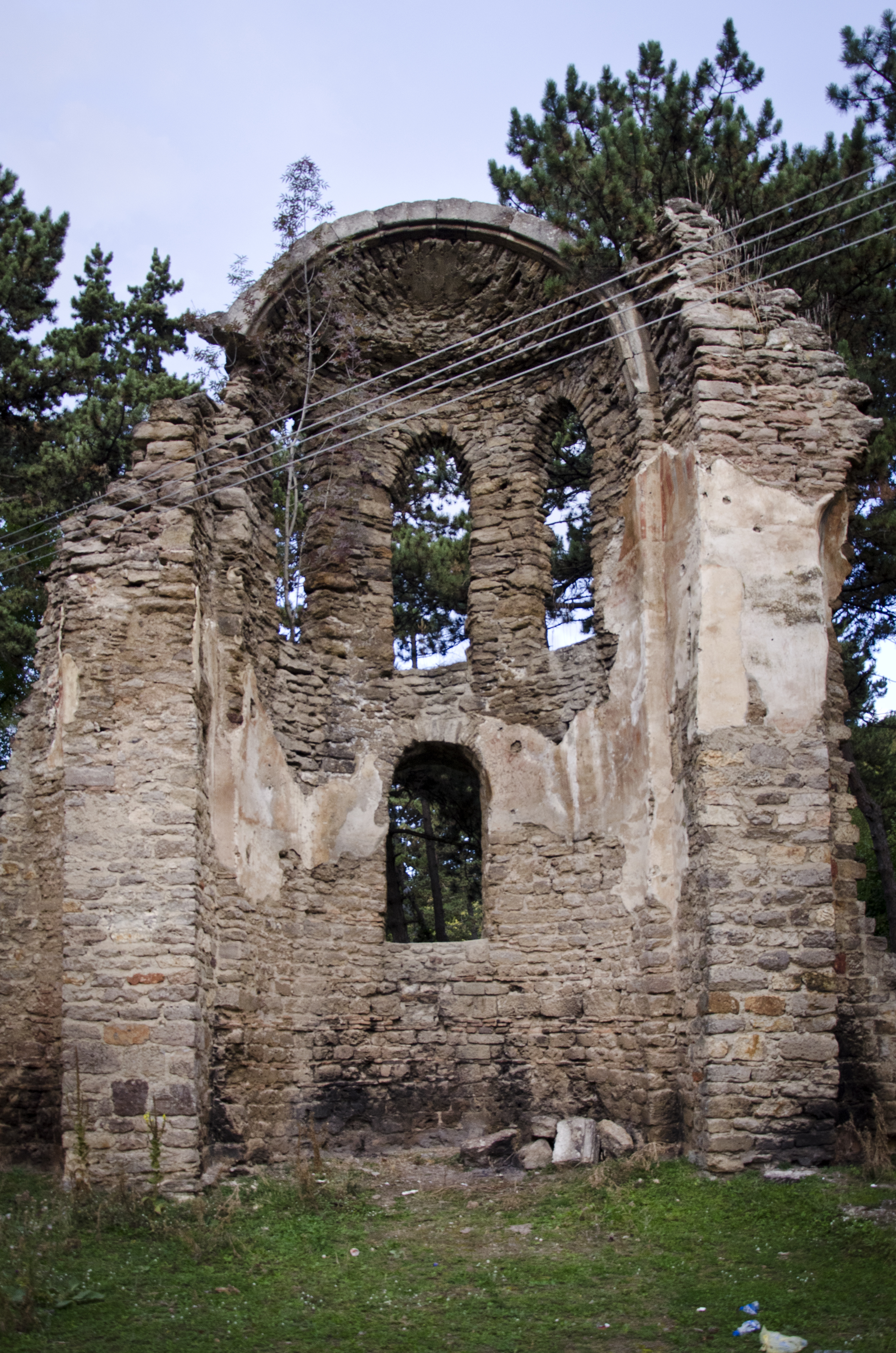 Gërmadhat e Kishës “Latine / Katolike, Sakse”, “Shën Pjetri”” - Ambienturë